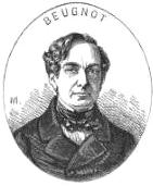 "La Commission de permanence de l'Assemblée nationale". (Détail : "BEUGNOT")